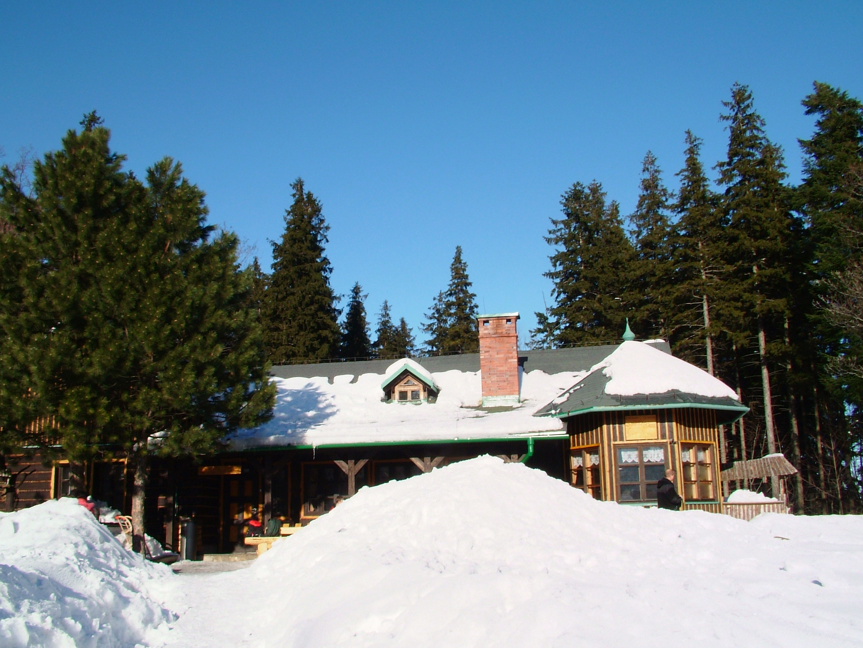 Schronisko Stefanka w Bielsku-Bialej w zimowej szacie